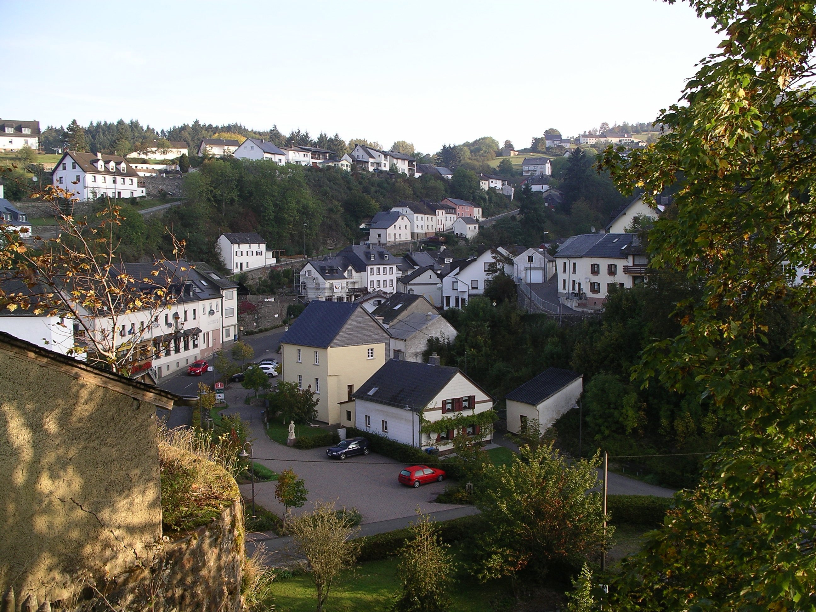 Blick auf den Ort Dasburg, von der Burg aus gesehen